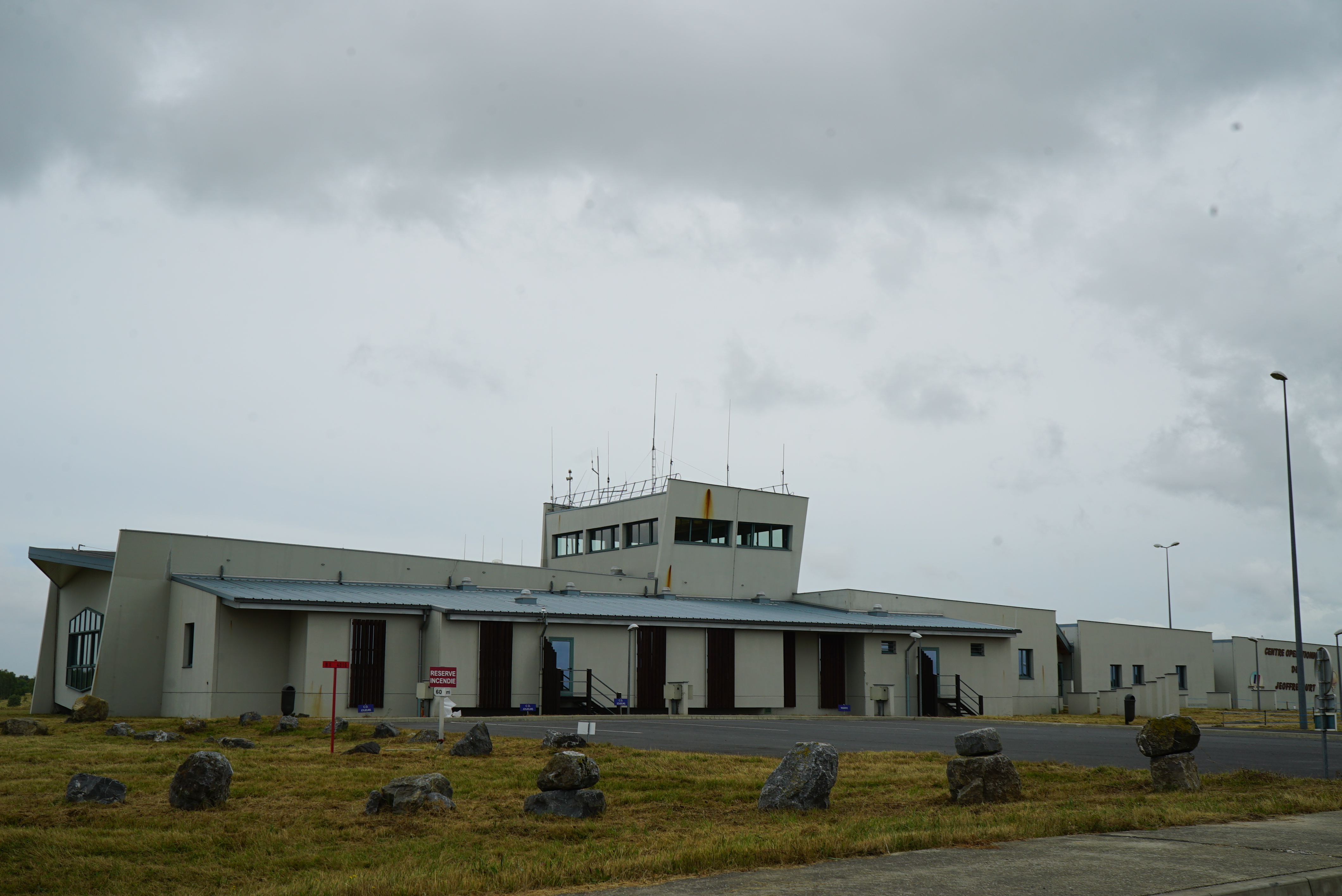 dans Jeoffrécourt, journée portes ouvertes.